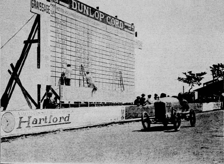 Tableau d'affichage de la deuxième Coupe Georges Boillot, en 1922 - Le Monde Illustré du 5 août 1922, p.135